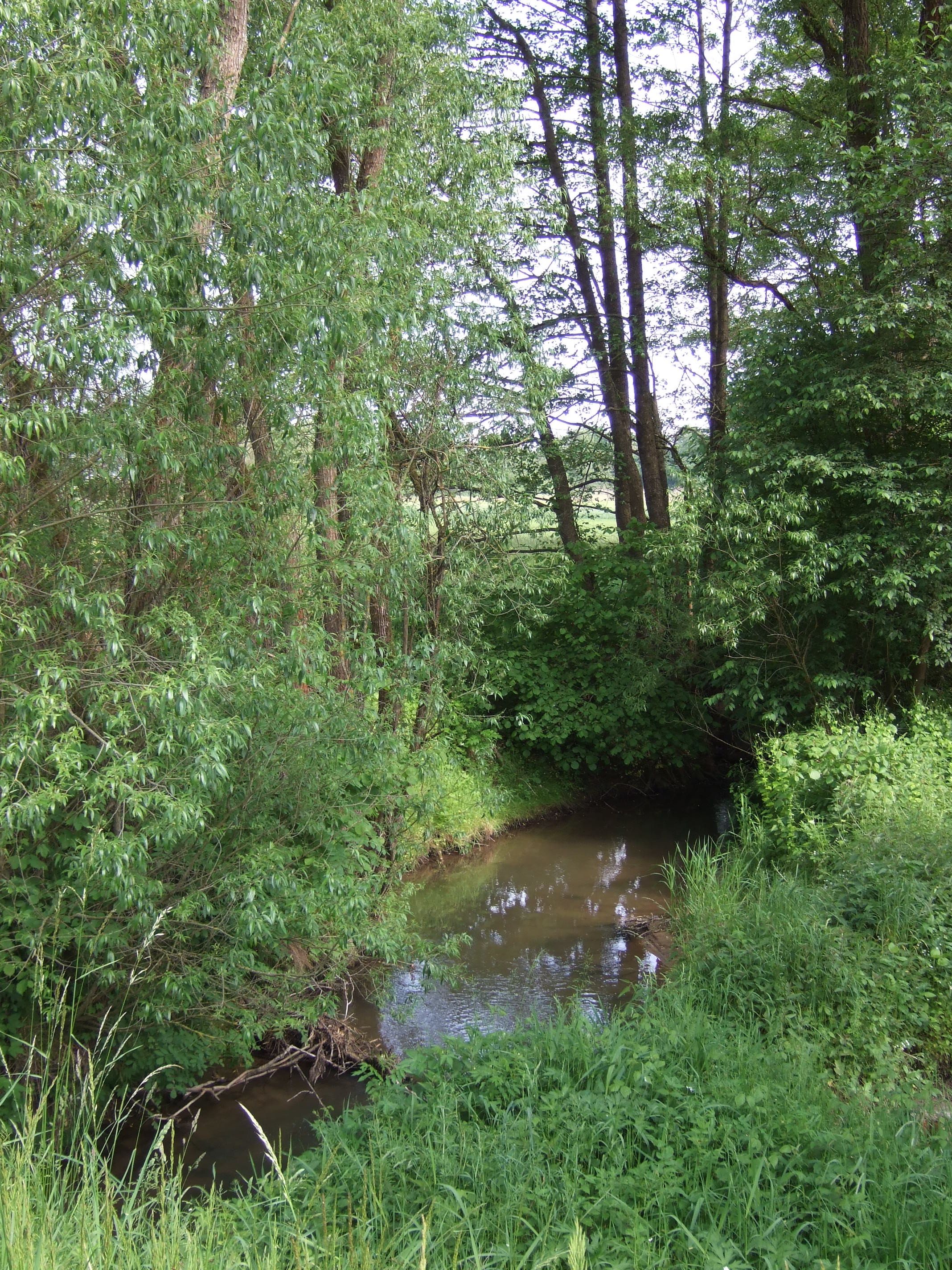 Die Trebgast bei Harsdorf